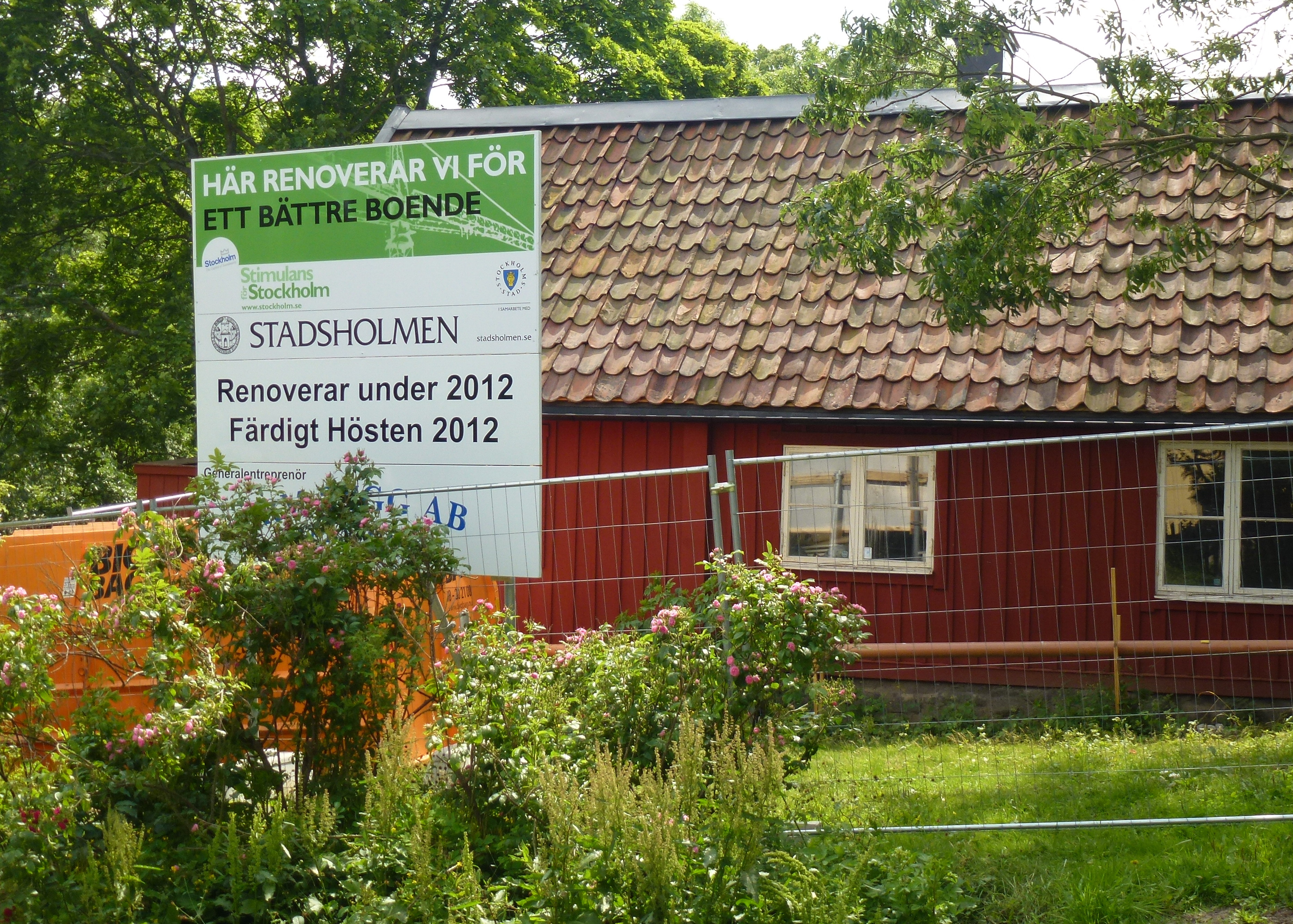 Fastigheten Stenkolet 2 under renovering